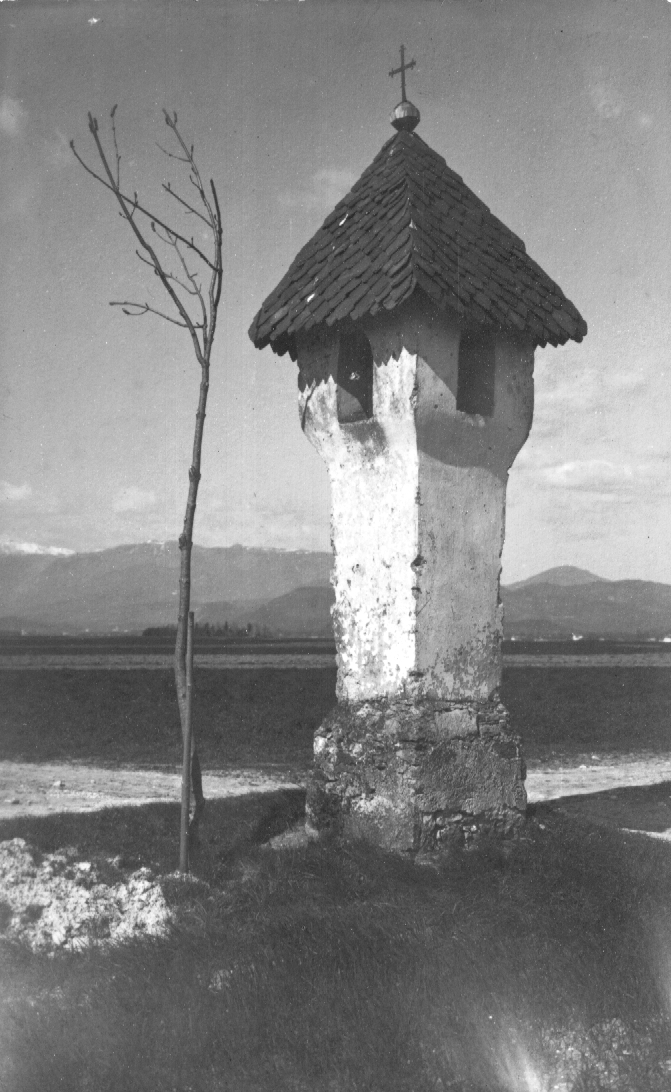 Znamenje v Loki pri Mengšu